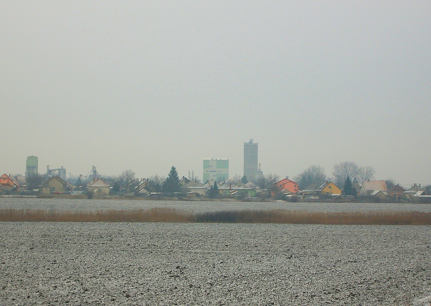 Zichyújfalu község a távolból.